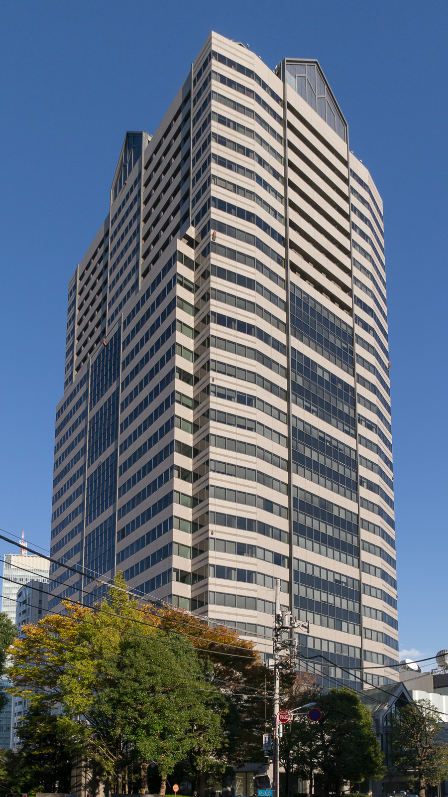 赤坂パークビル/グリーンパーク赤坂、東京都港区赤坂5丁目。